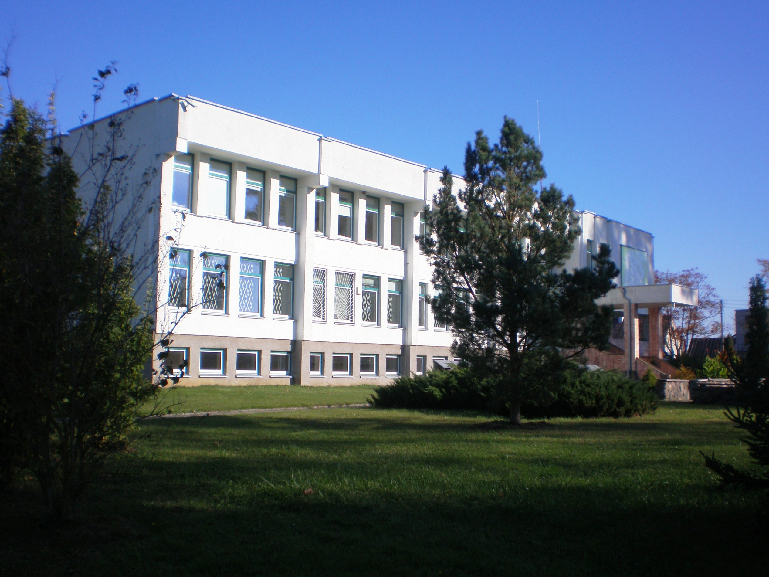 Kėdainių miškų urėdija